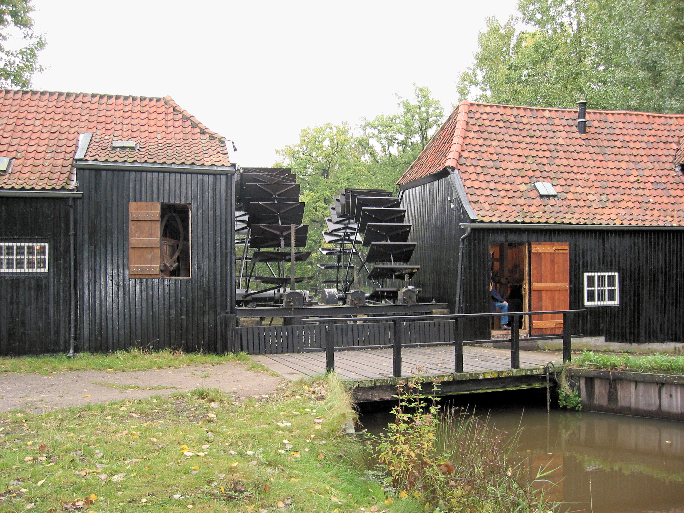 Collse Watermolen, zuidkant, Eindhoven-Tongelre, the Netherlands